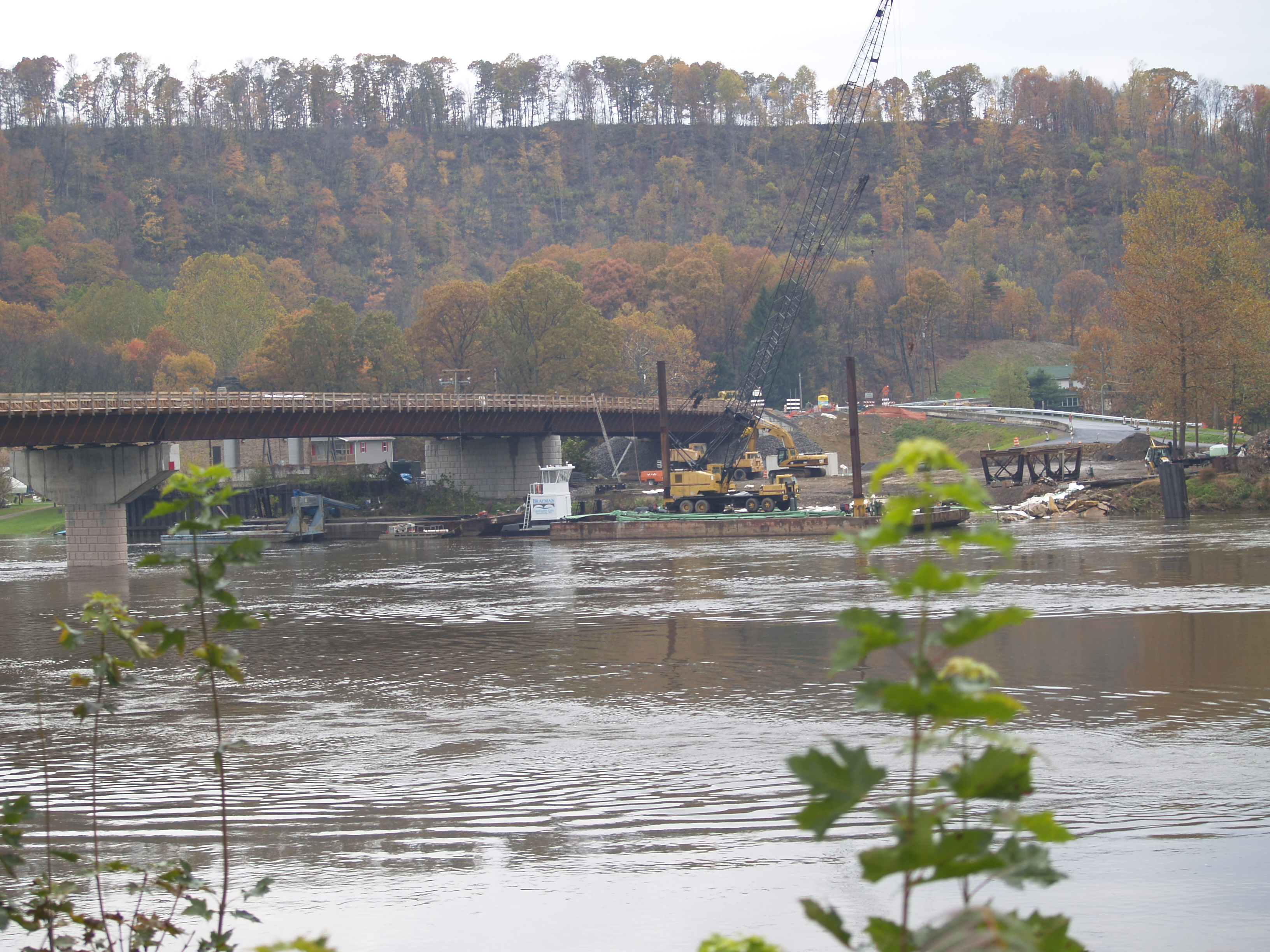 pa221170